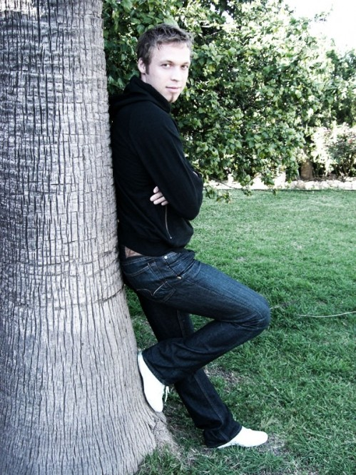 Andreas_Hinkel